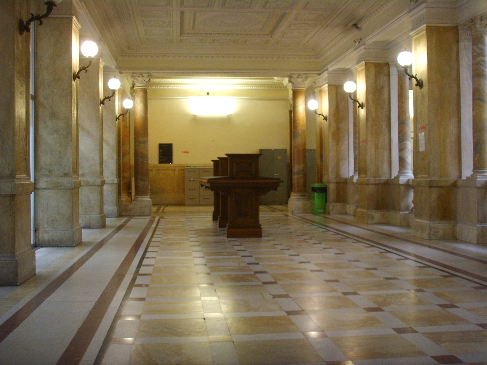 Palazzo delle poste (Firenze), atrio